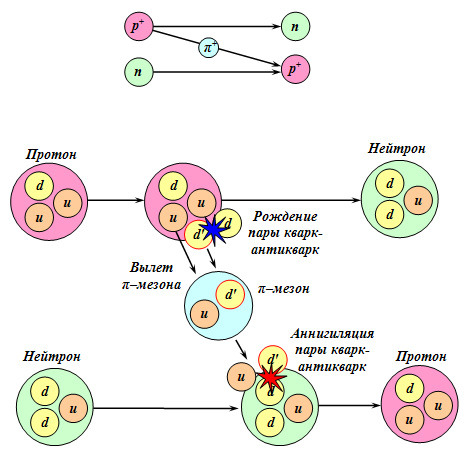 Кварковая модель нуклон-пионного взаимодействия